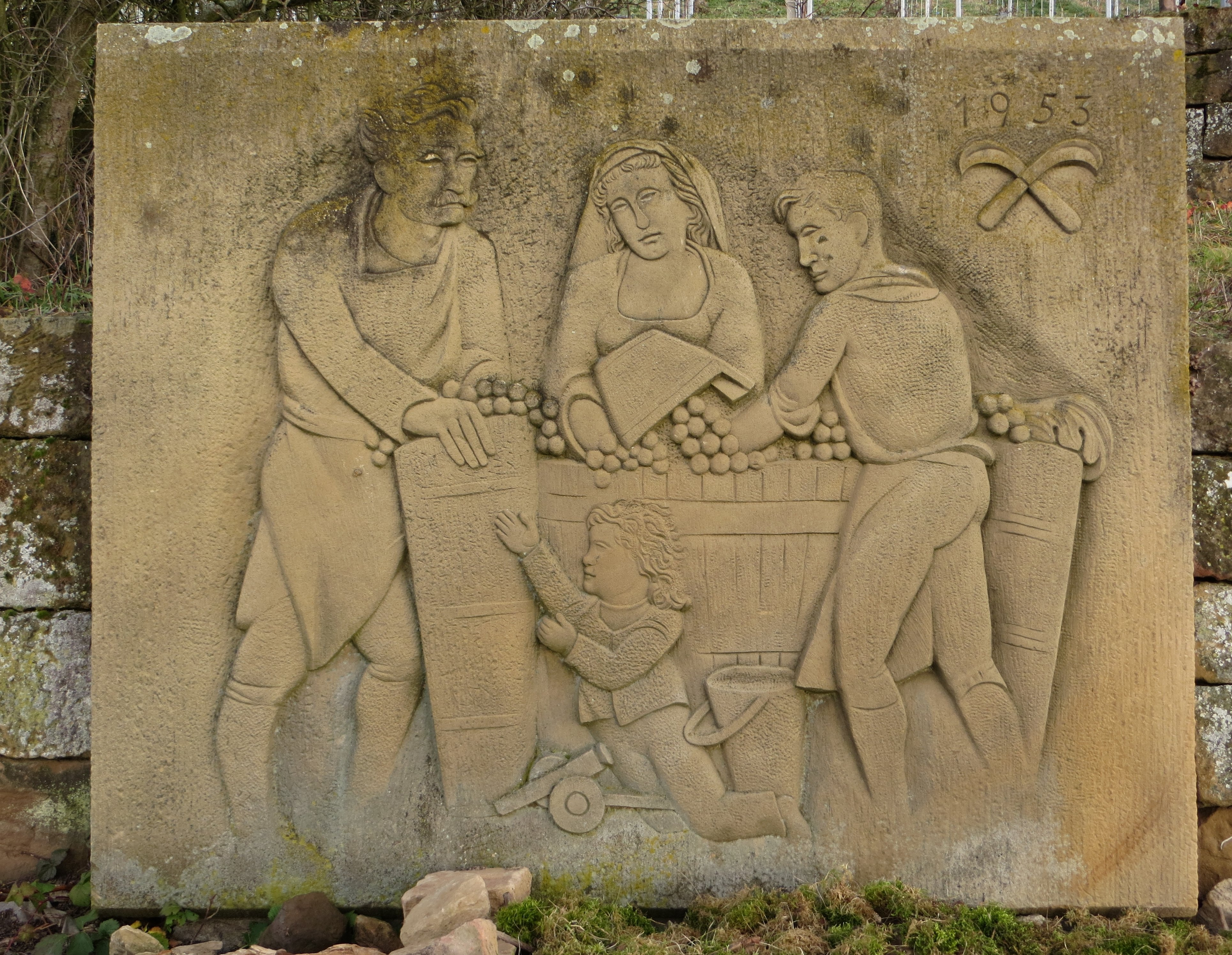 Sandsteinrelief Weingärtnerfamilie aus dem Jahr 1953 von Hermann Brellochs am Panoramaweg, Wartberg, Heilbronn.[1] Der Vater trägt die Züge von Hermann Schneider.